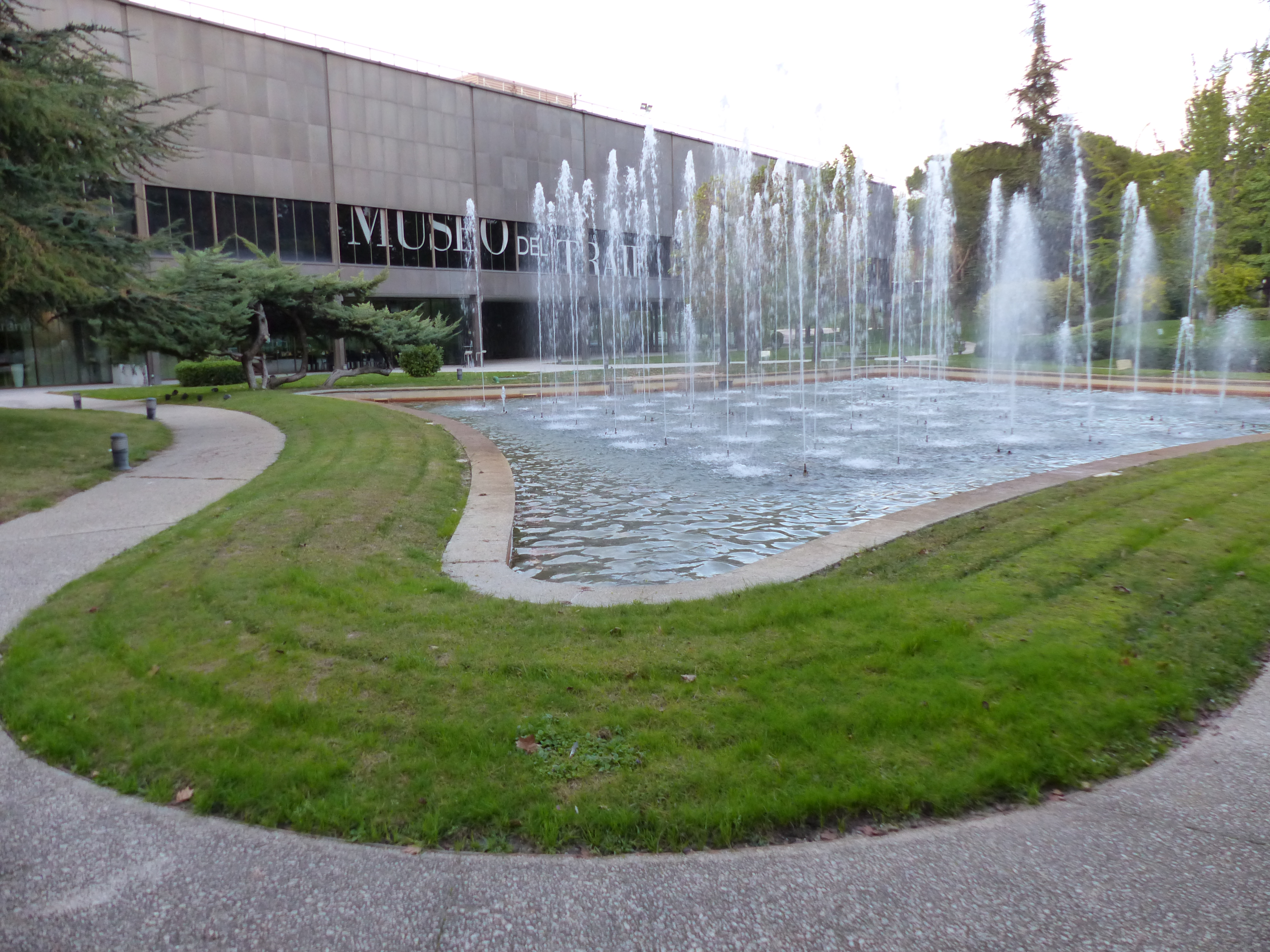 Museo del Traje, fuente frente al museo.